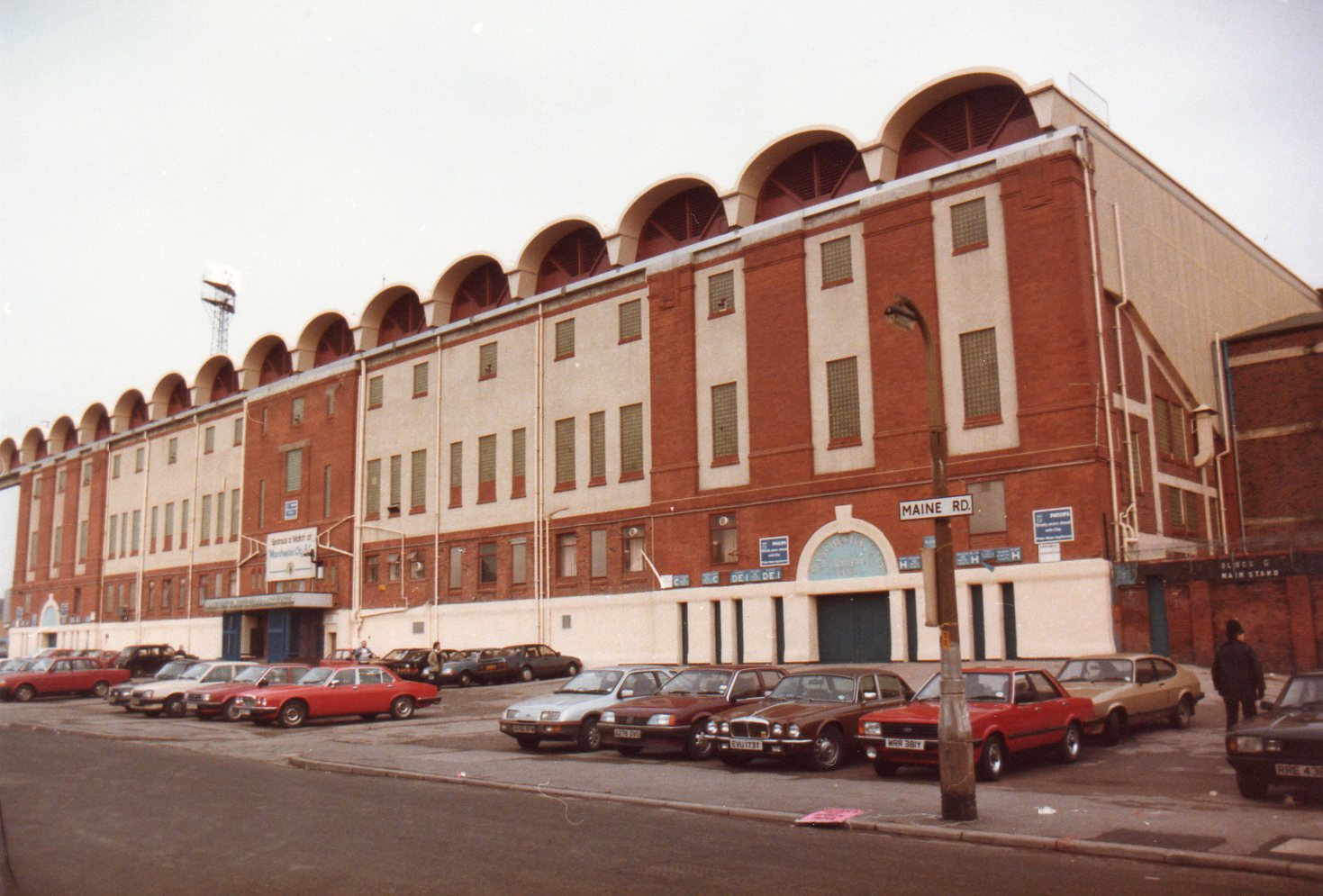 Main Stand, Maine Road Stadium, Manchester in 1985.